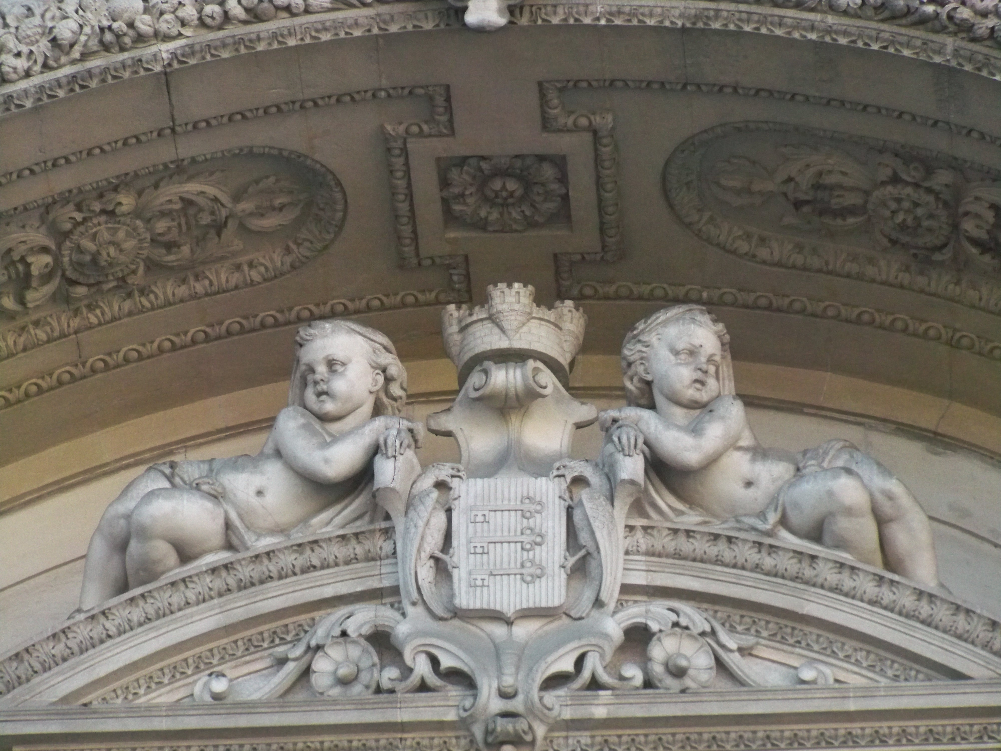 Détail de l'Opéra Théatre d'Avignon